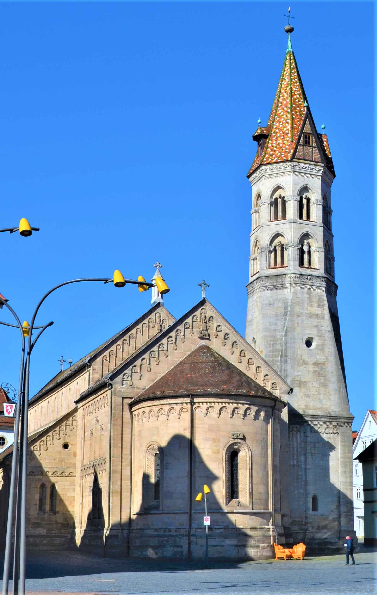 Johanniskirche in Schwäbisch Gmünd vom Marktplatz aus aufgenommen